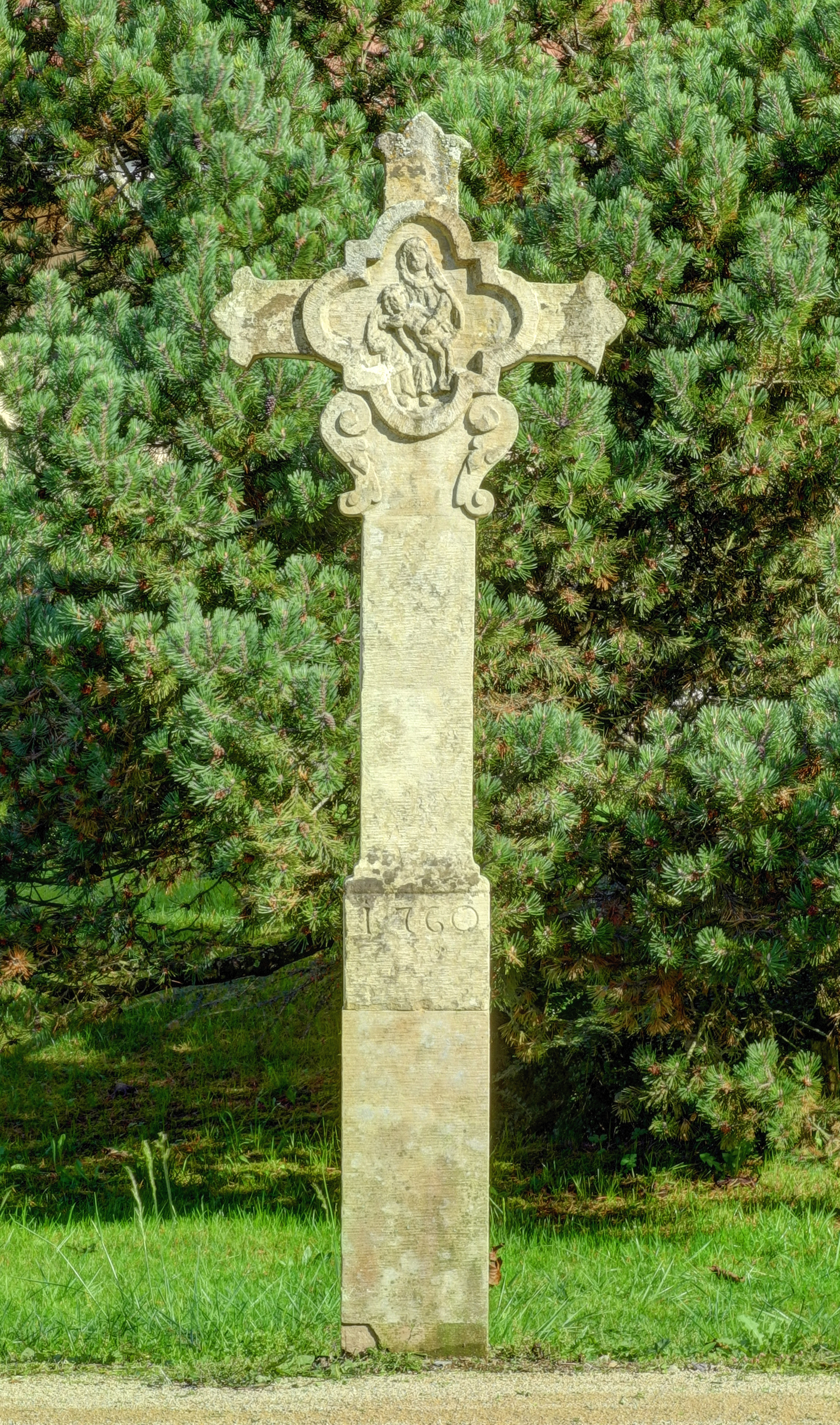 Croix de chemin de Frais, classée Monument Historique sous le n°PA00101149 (HDR).